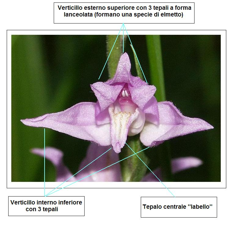 Cephalanthera rubra